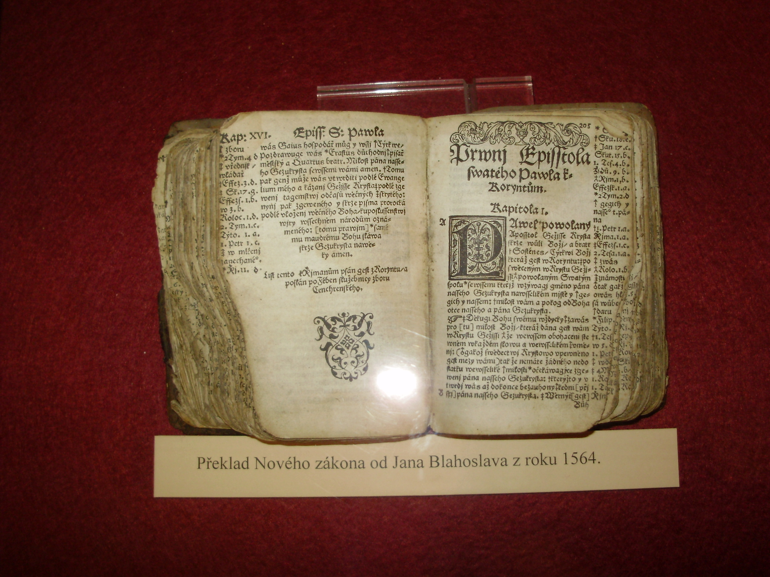 Překlad Nového zákona